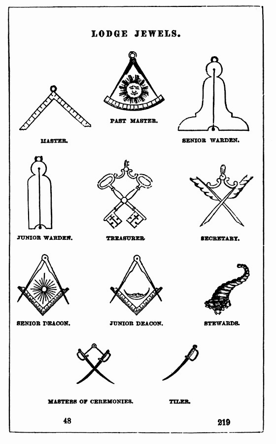 Bijoux maçonniques des officiers de loge selon l'ouvrage Ahiman Rezon publié en 1756.